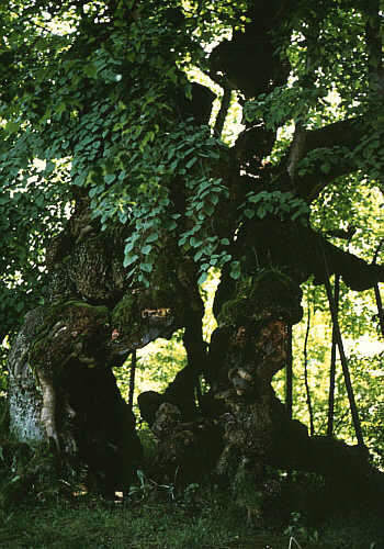 1000-jährige Wolframslinde im Bayerischen Wald